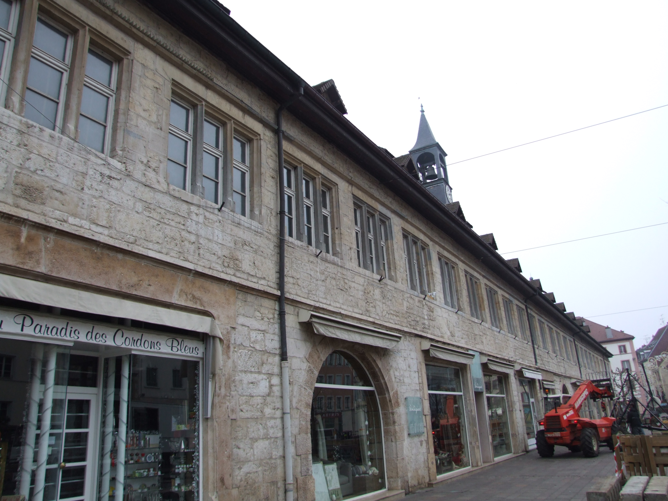 Halles de Montbéliard, Doubs, Franche-Comté, FRANCE